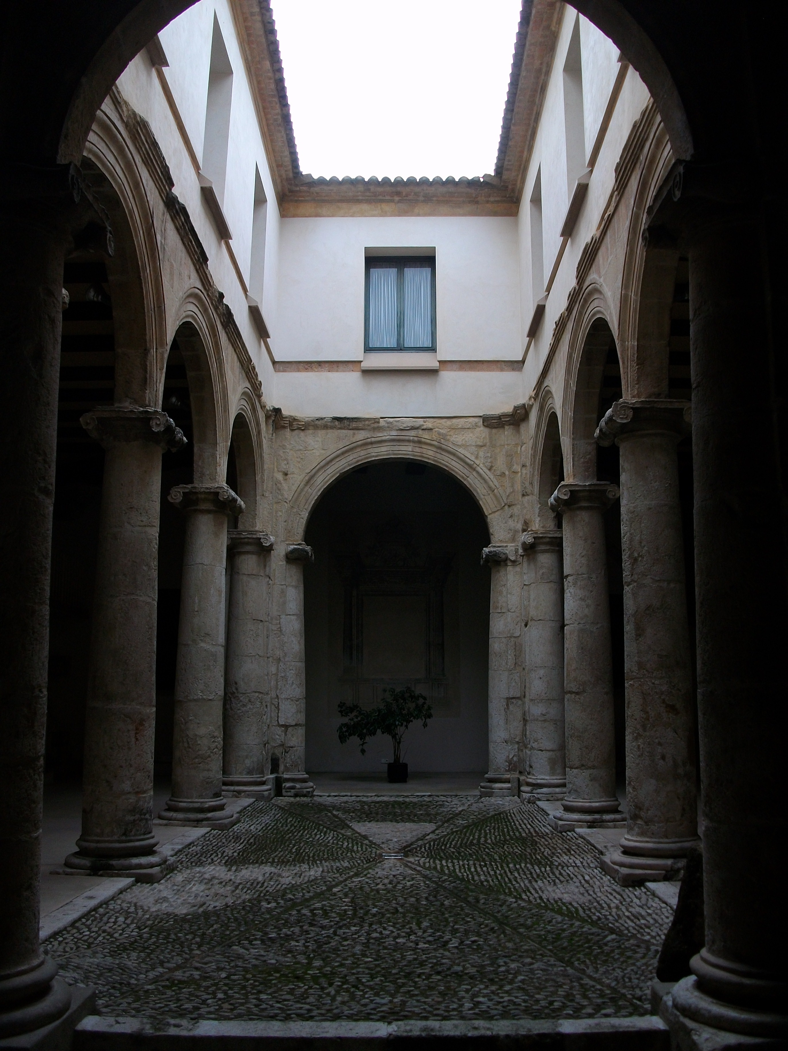 Pati renaixentista de l'Almodí de Xàtiva.